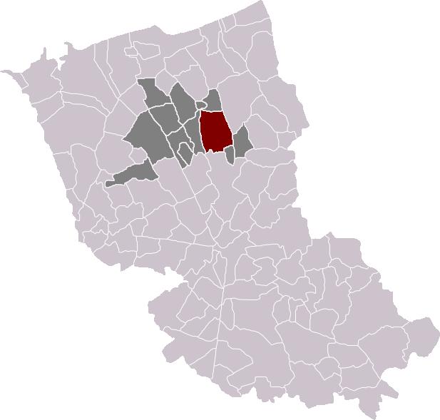 Locatie gemeente Kwaadieper in arrondissement Duinkerke. Zelfgemaakt. Location of Quaëdypre municipality in the arrondissement of Dunkirk. Self made. Localisation de la commune de Quaëdypre dans l'arrondissement de Dunkerque. Fait moi-même.